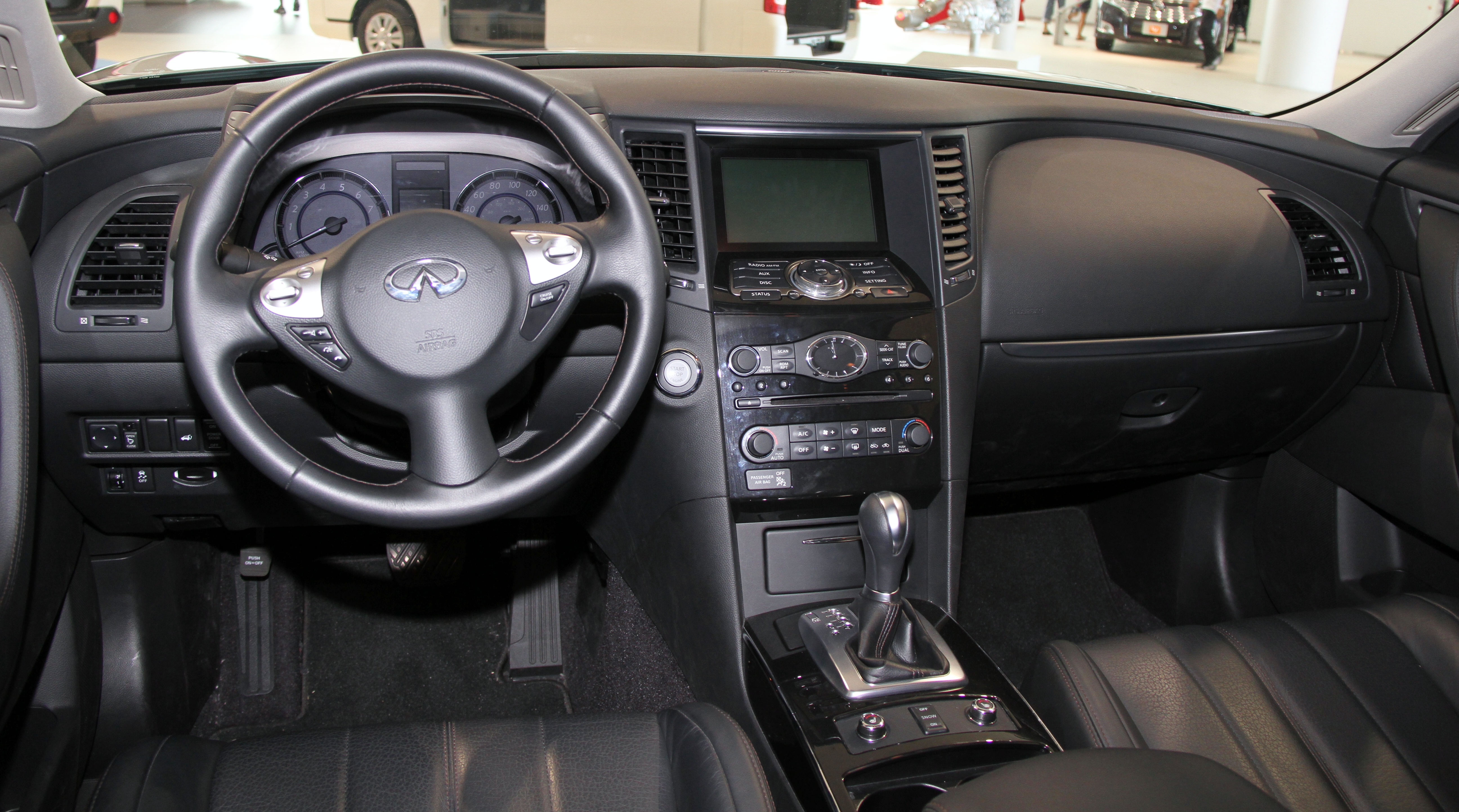 2012 Infiniti FX35 interior